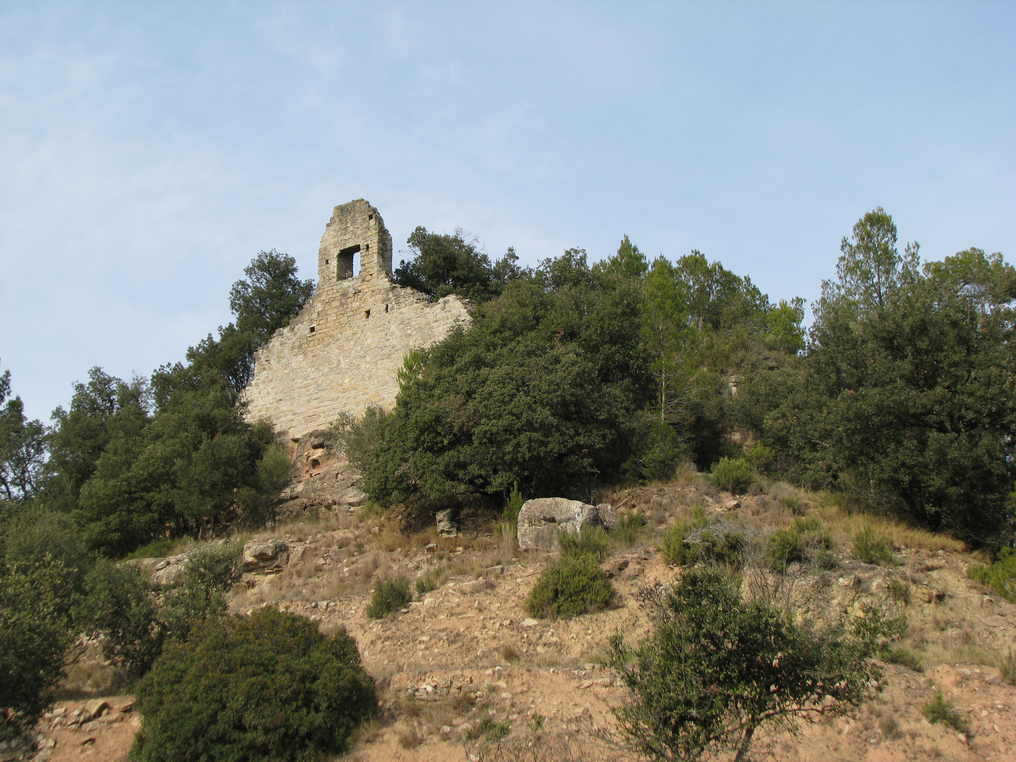 Ruïnes del castell de Rocafort, en el municipi del Pont de Vilomara i Rocafort (Bages)